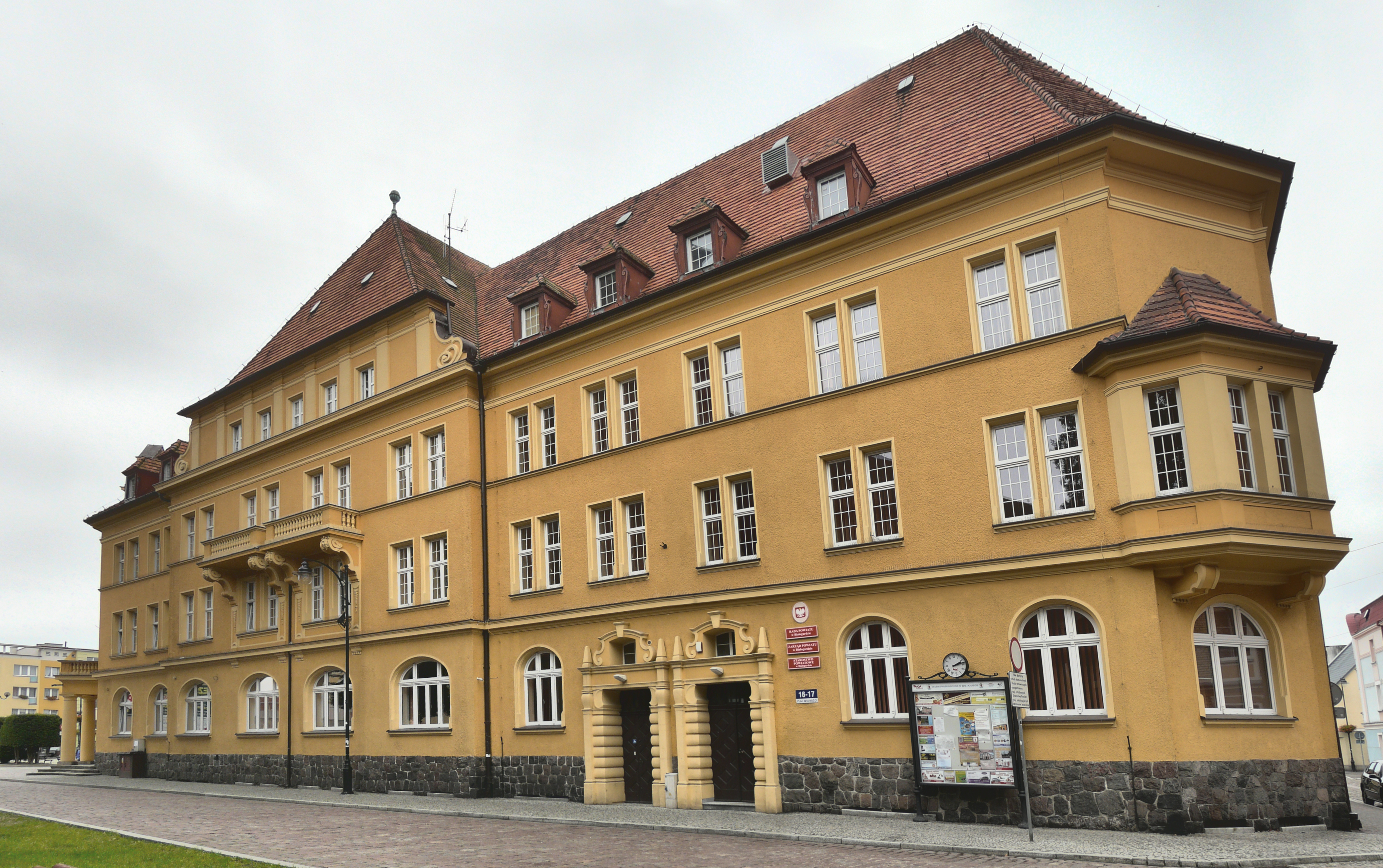 Białogard, nowy ratusz, ob. bank PKO (dec. dom), 1923-1924. Widok budynku od strony kościoła. Po załadowaniu na Wikimedia Commons to zdjęcie zostanie wykorzystane na mojej stronie